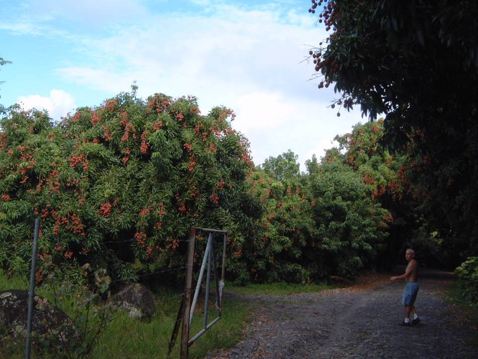 Je suis l'auteur de cette photo prise en Nov.2005